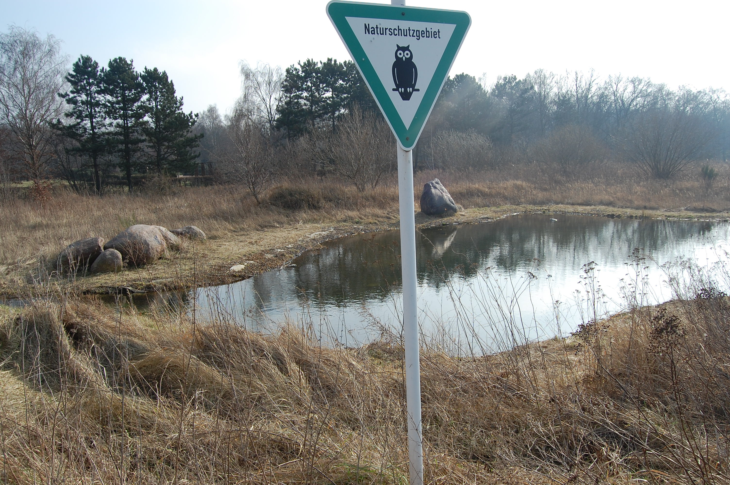 NSG Unkenpfuhle Marzahn, Berlin